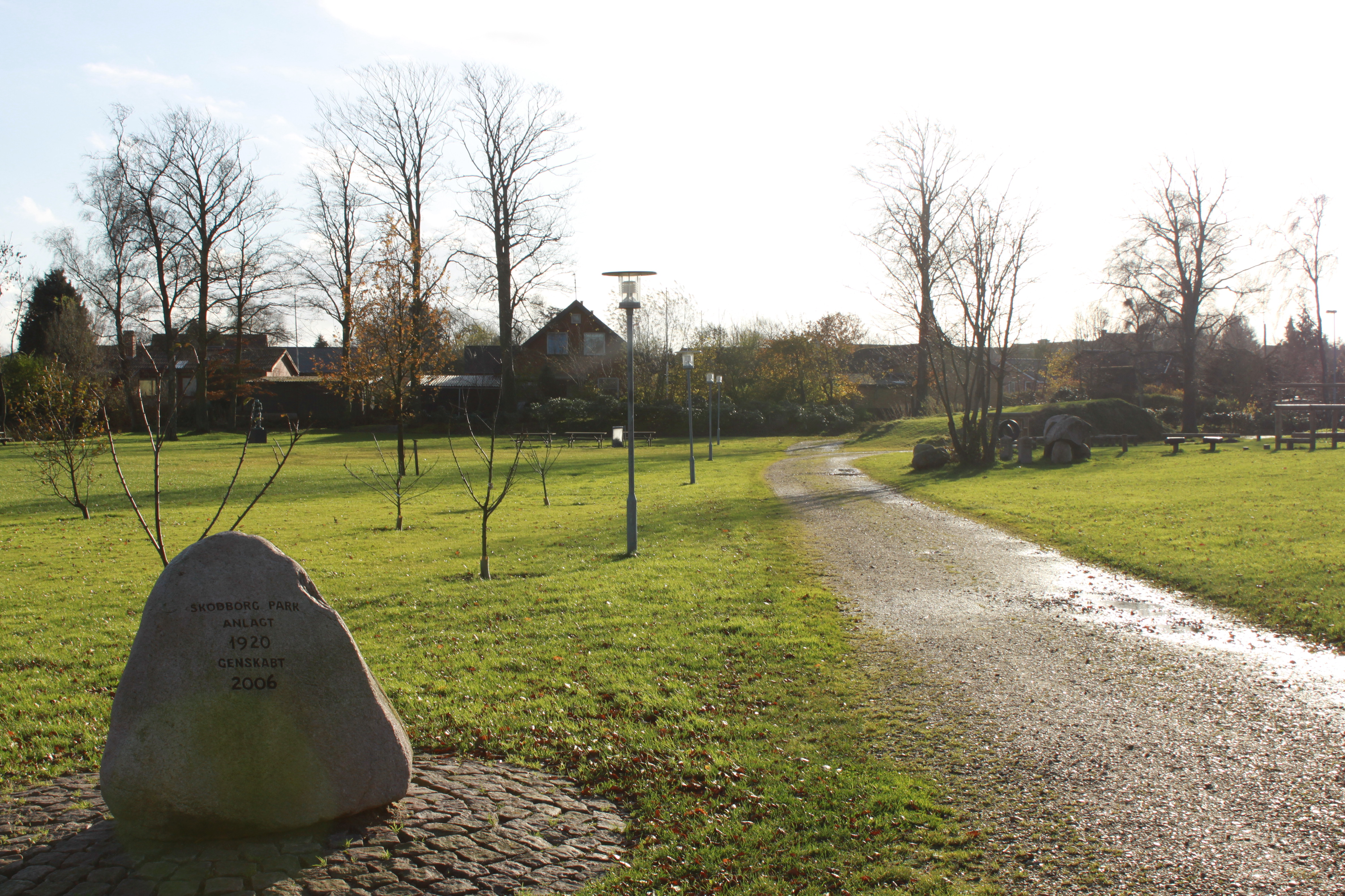 Skodborg Park